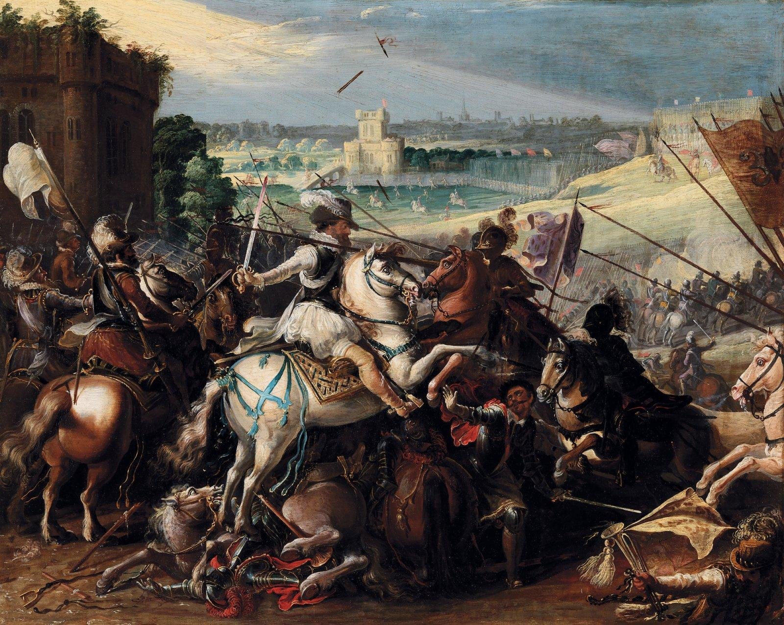 La bataille dArques, attribué à Adriaen van STALBEMT (1580-1662), fin XVIe-début XVIIe siècle.